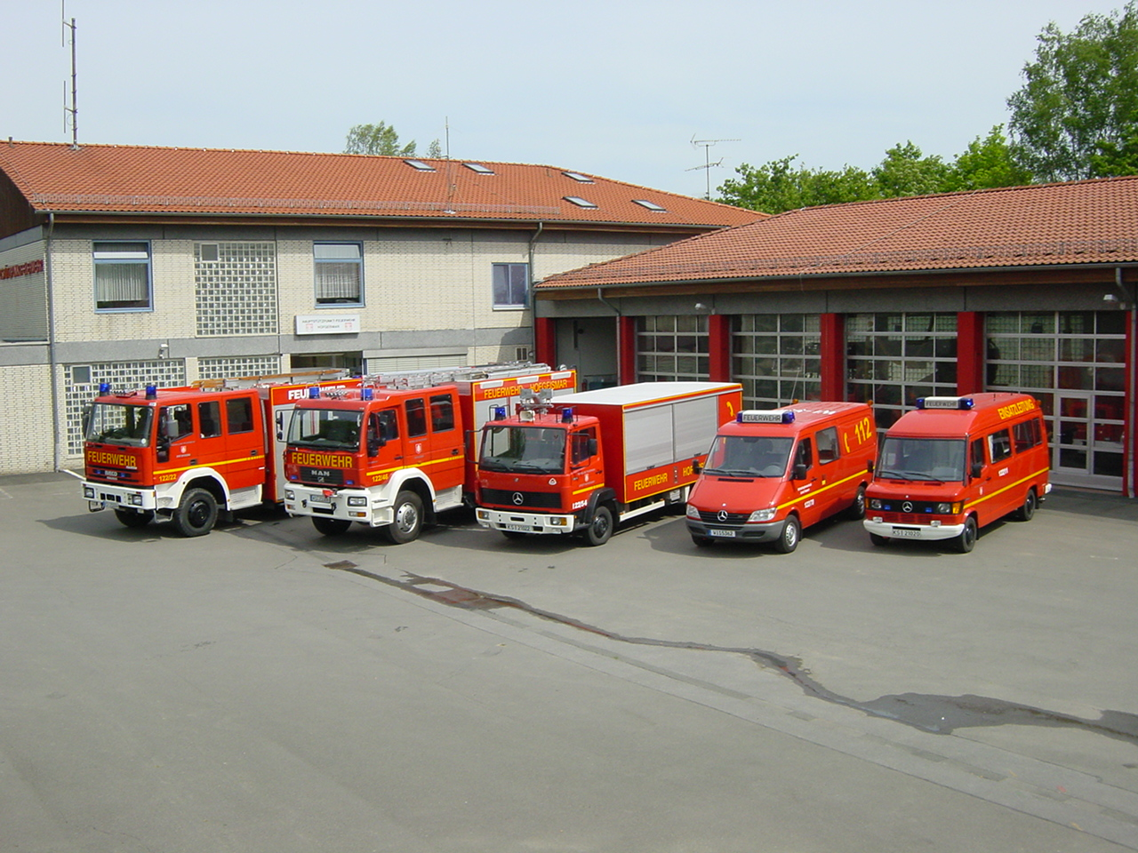 Gefahrstoffzug der Feuerwehr Hofgeismar